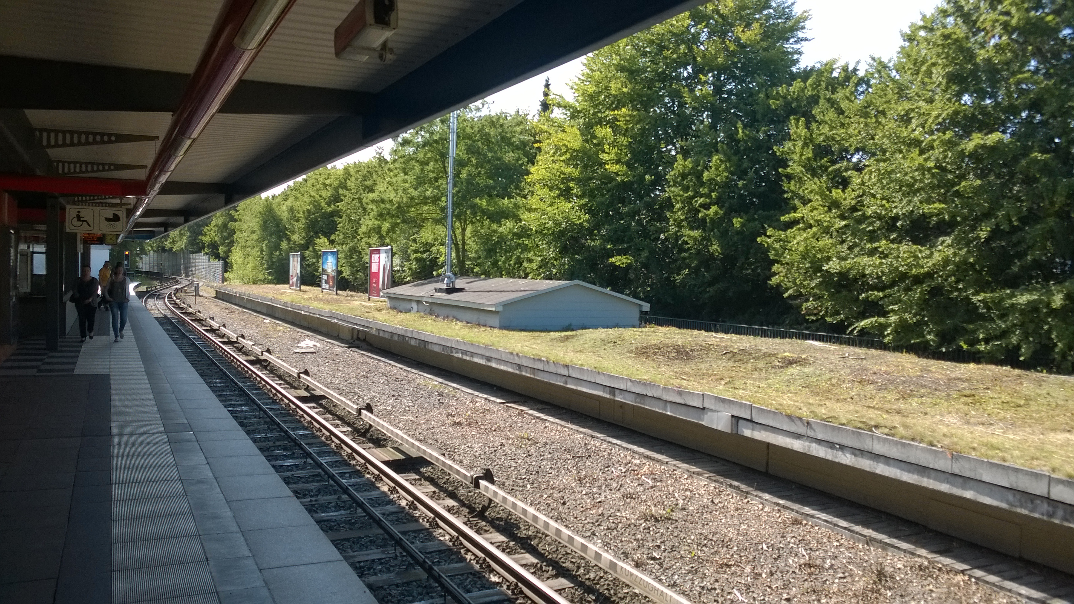 Nie in Betrieb genommener Bahnsteig des U-Bahnhof Sengelmannstraße. Vorleistung für die U4 (alt) und ggf. nutzbar für die U5 (geplant)